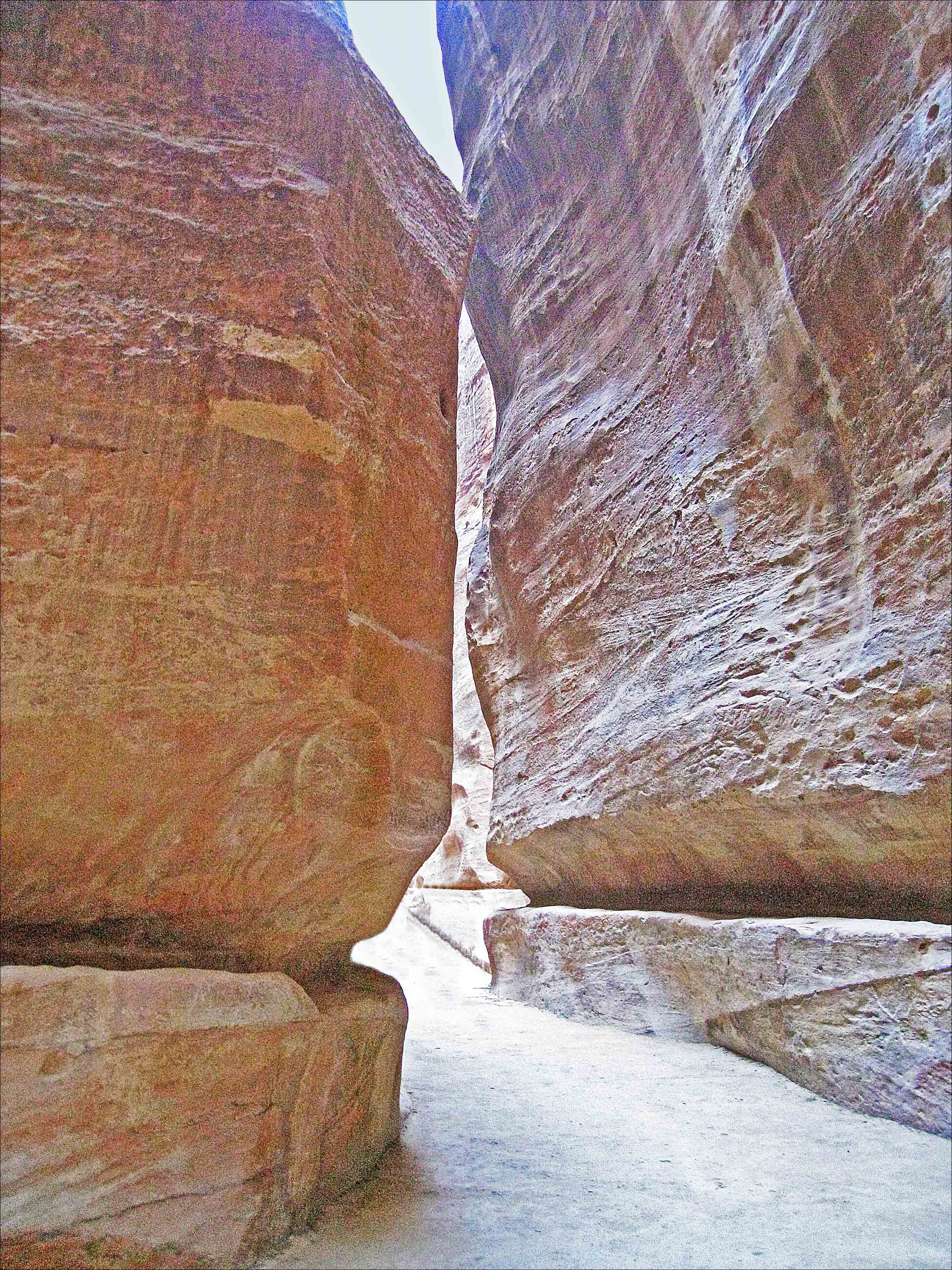 Les canaux creusés de chaque coté dans le rocher le long du Siq.